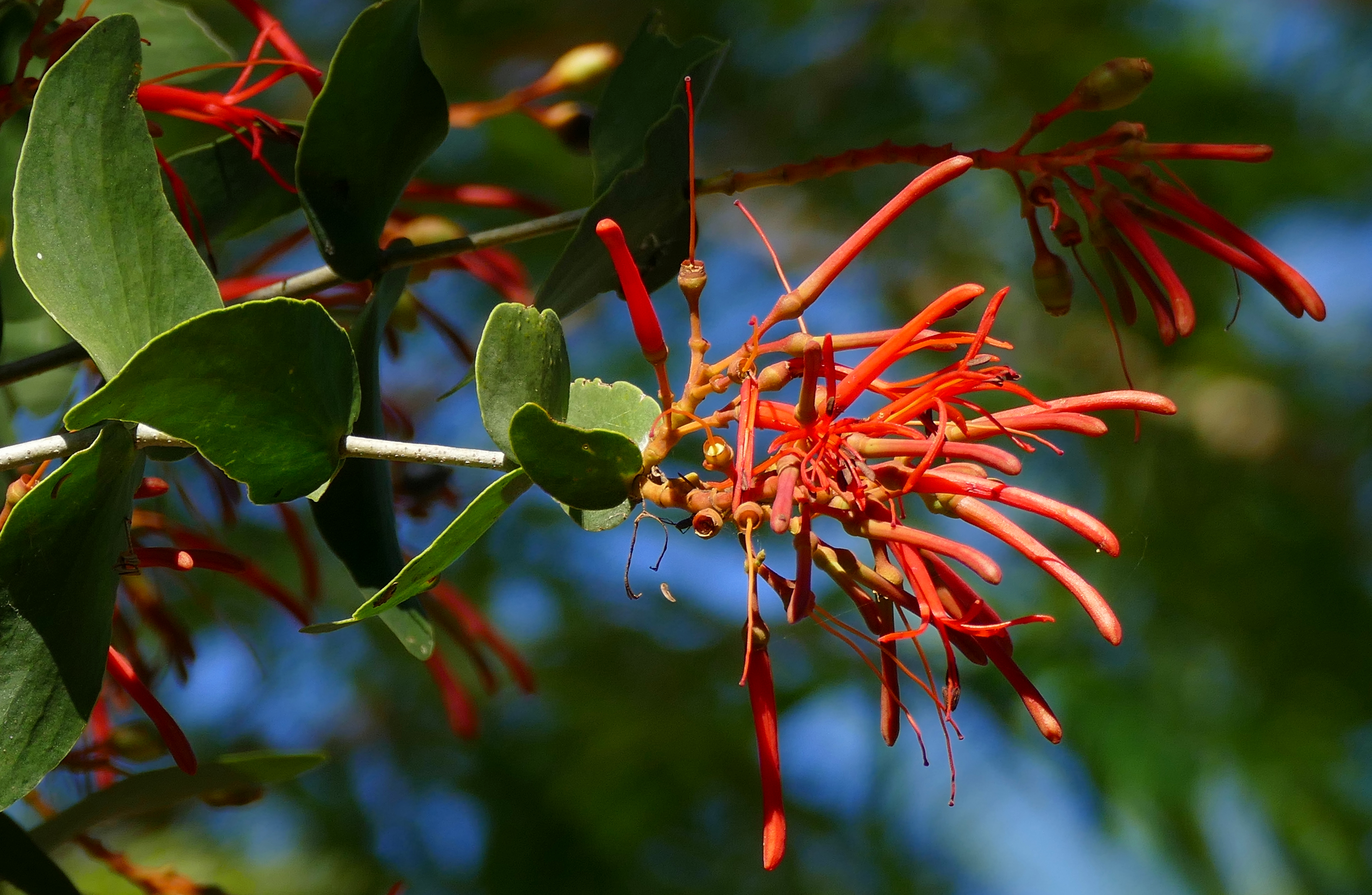 Pouso Alegre, Transpantaneira, Poconé, Mato Grosso, BRAZIL